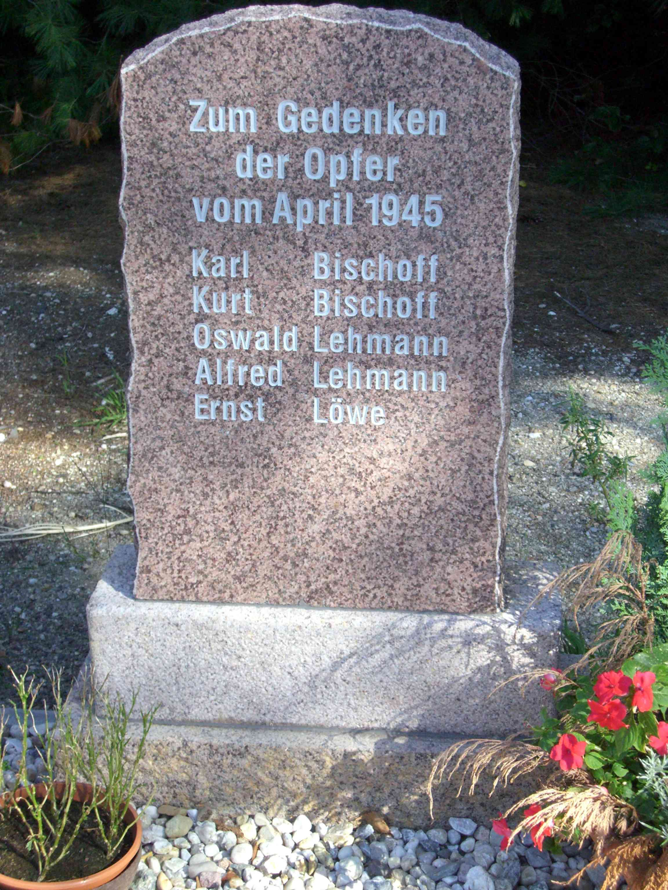 Reichenhain